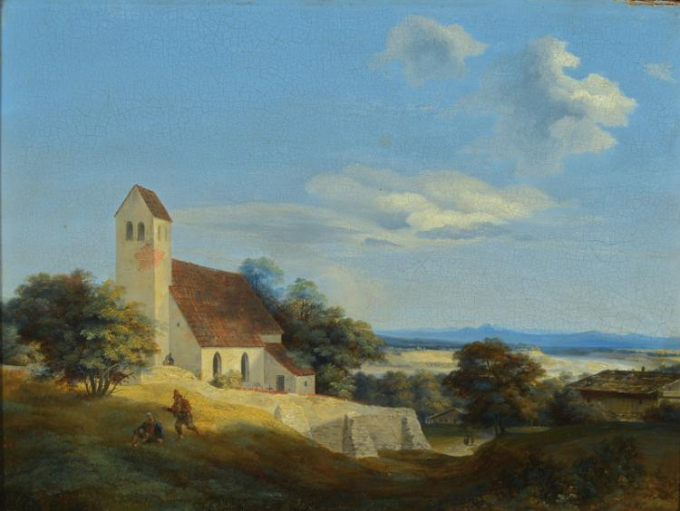 Blick über die Ebene auf die Alpen, im Vordergrund eine Kapelle